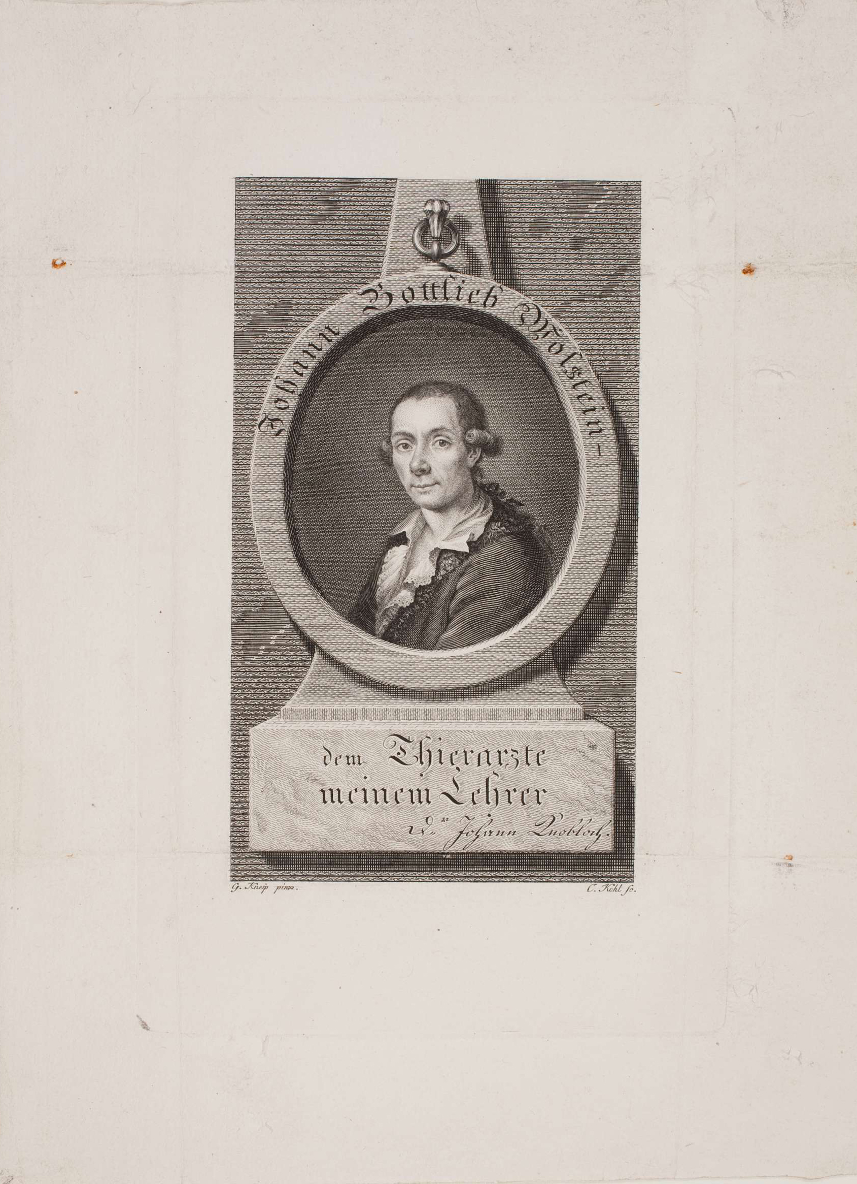 Johann Gottlieb Wolstein (nach Gebhard Kneip)